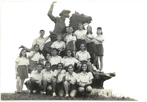 Estatua de Máximo Gómez grupo 313 graduación 2000, IPVCE